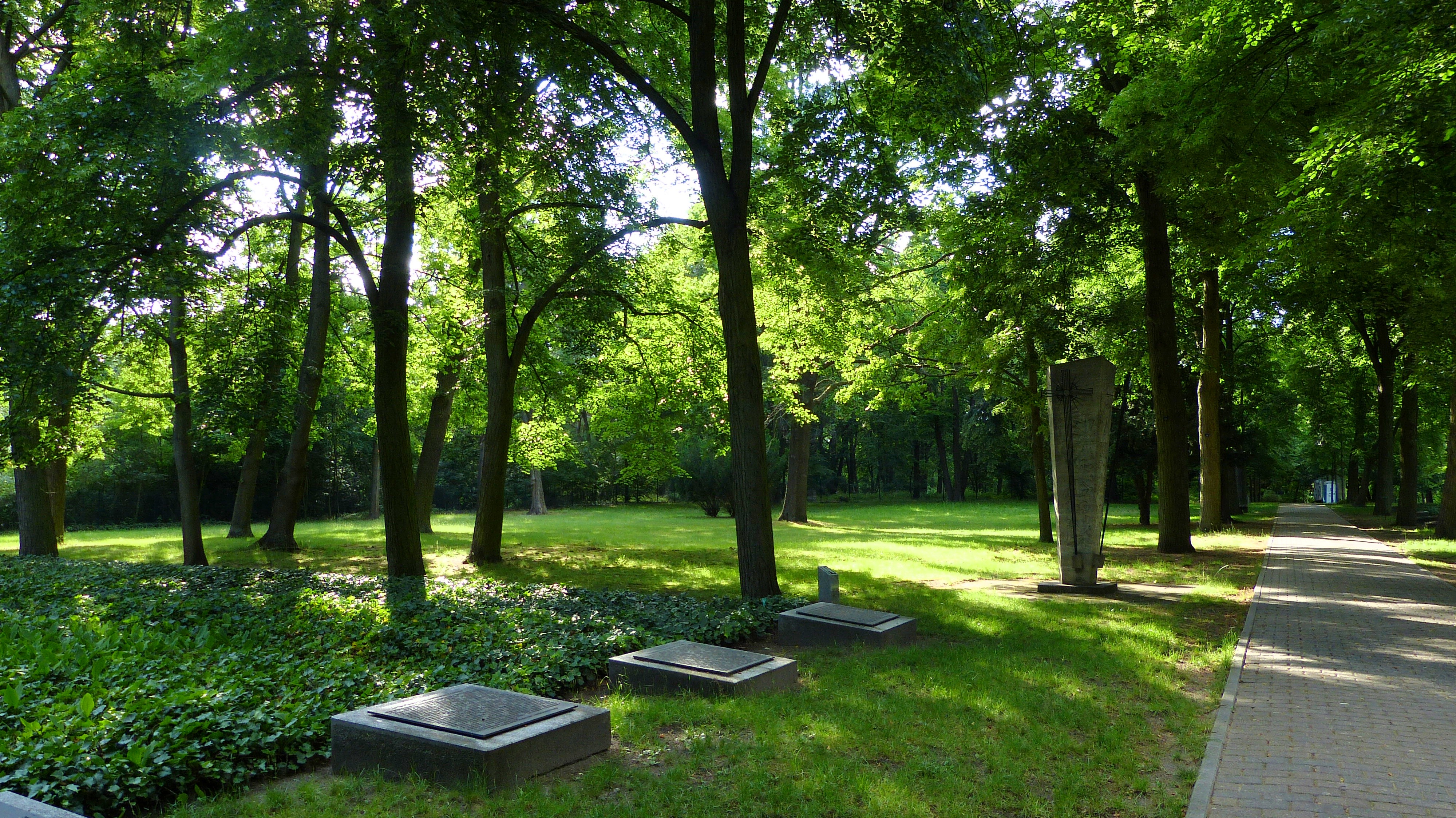 In der Mitte das Denkmal von Karl Wenke und links die Sammelgräber